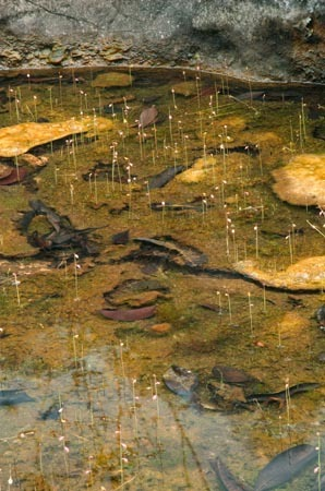 Utricularia sp. growing in Bau, Sarawak